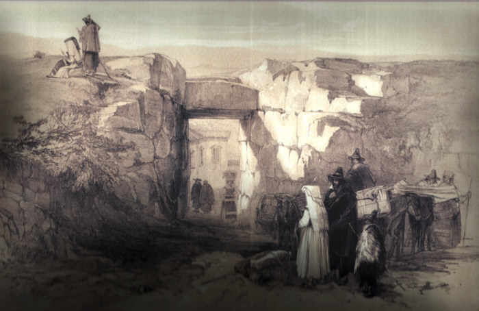 Alatri, interno di Porta Maggiore (Acropoli). Dipinto di Edward Lear.